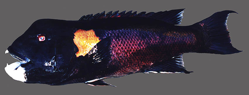 Llamado "peje perro" o "vieja" en Perú, es actualmente uno de los peces marinos más amenazados de esta región a causa de la pesca ilegal (explosivos) y la caza submarina. Se está analizando la información para incluirlo dentro de la lista roja de especies en peligro del Perú.